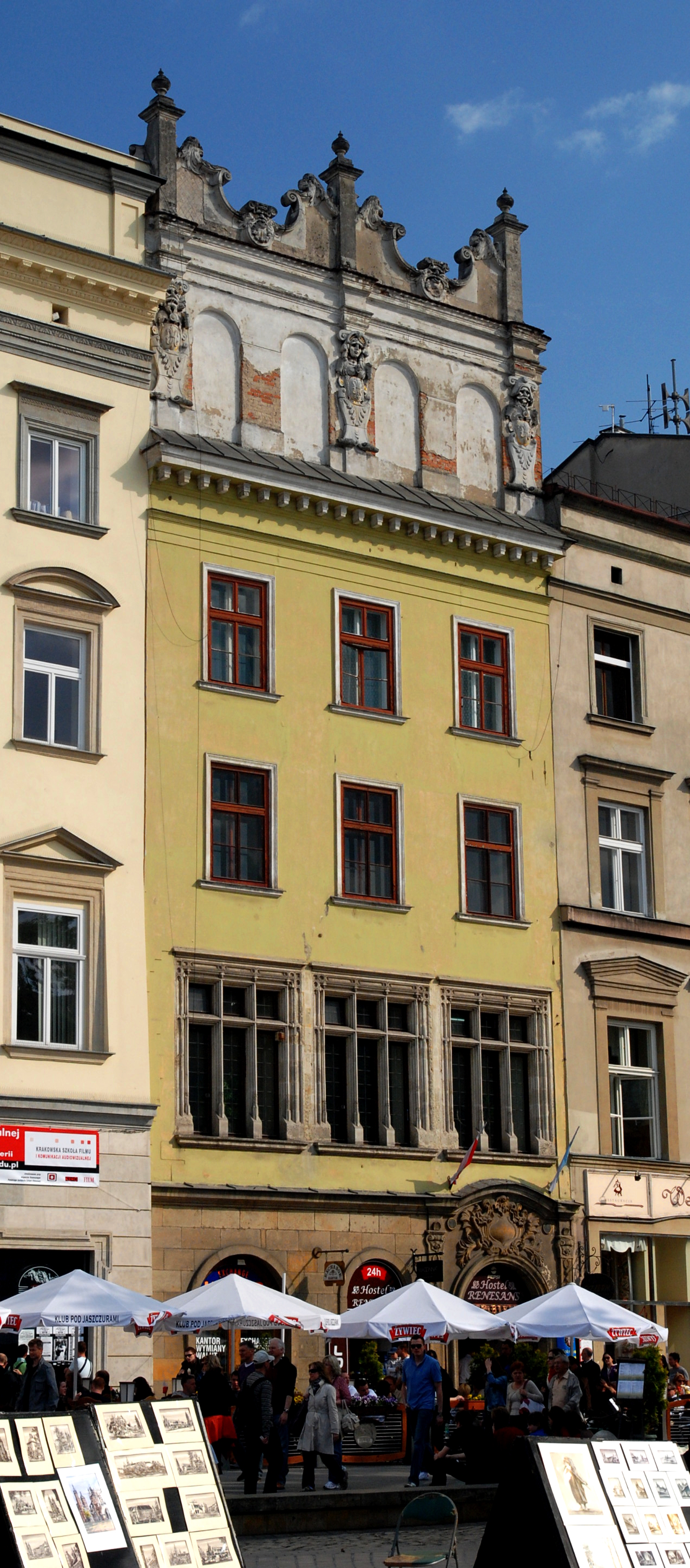 Kamienica Bonerowska. Rynek Główny nr 9, Kraków